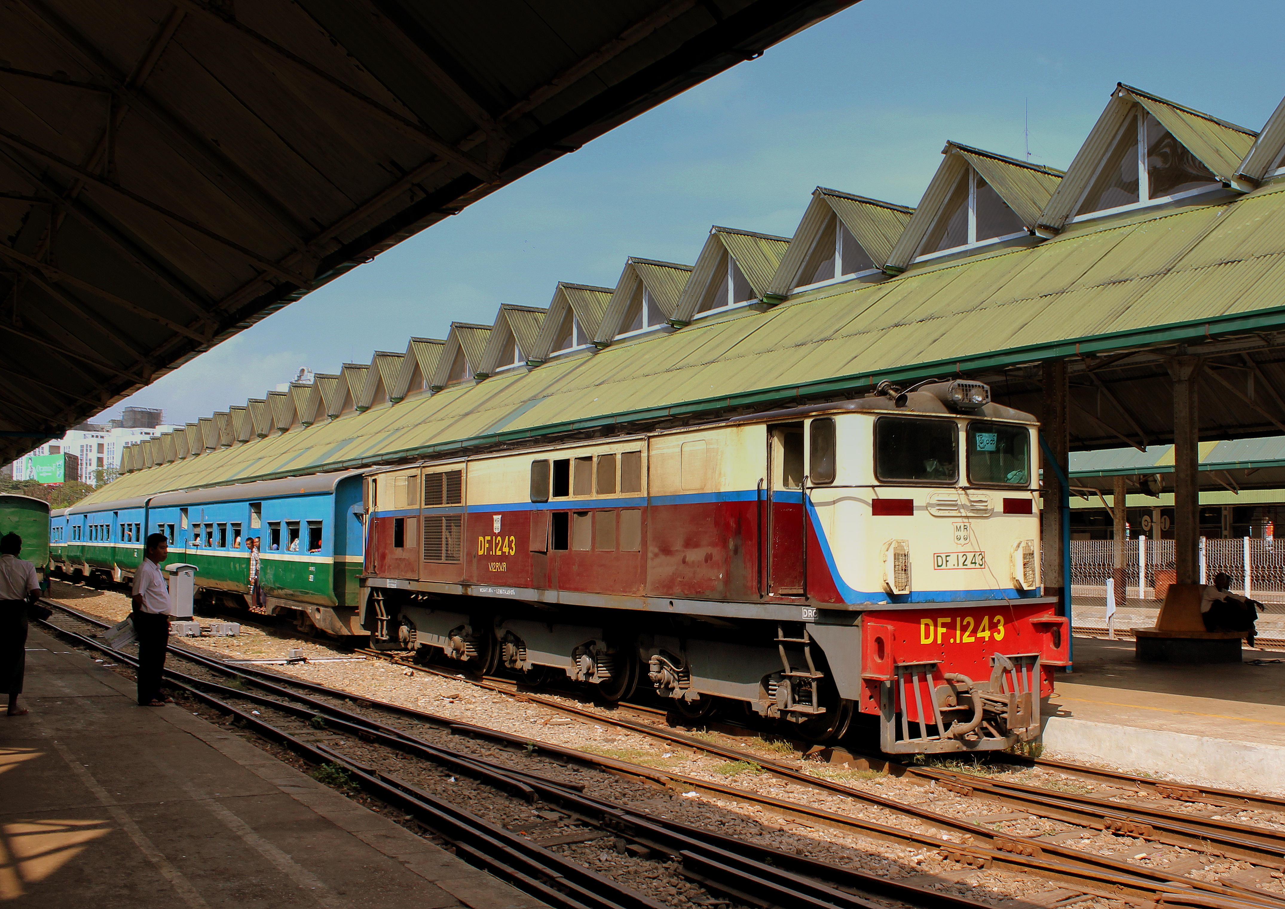 YANGON RAILWAY STATION MYANMA JAN 2013